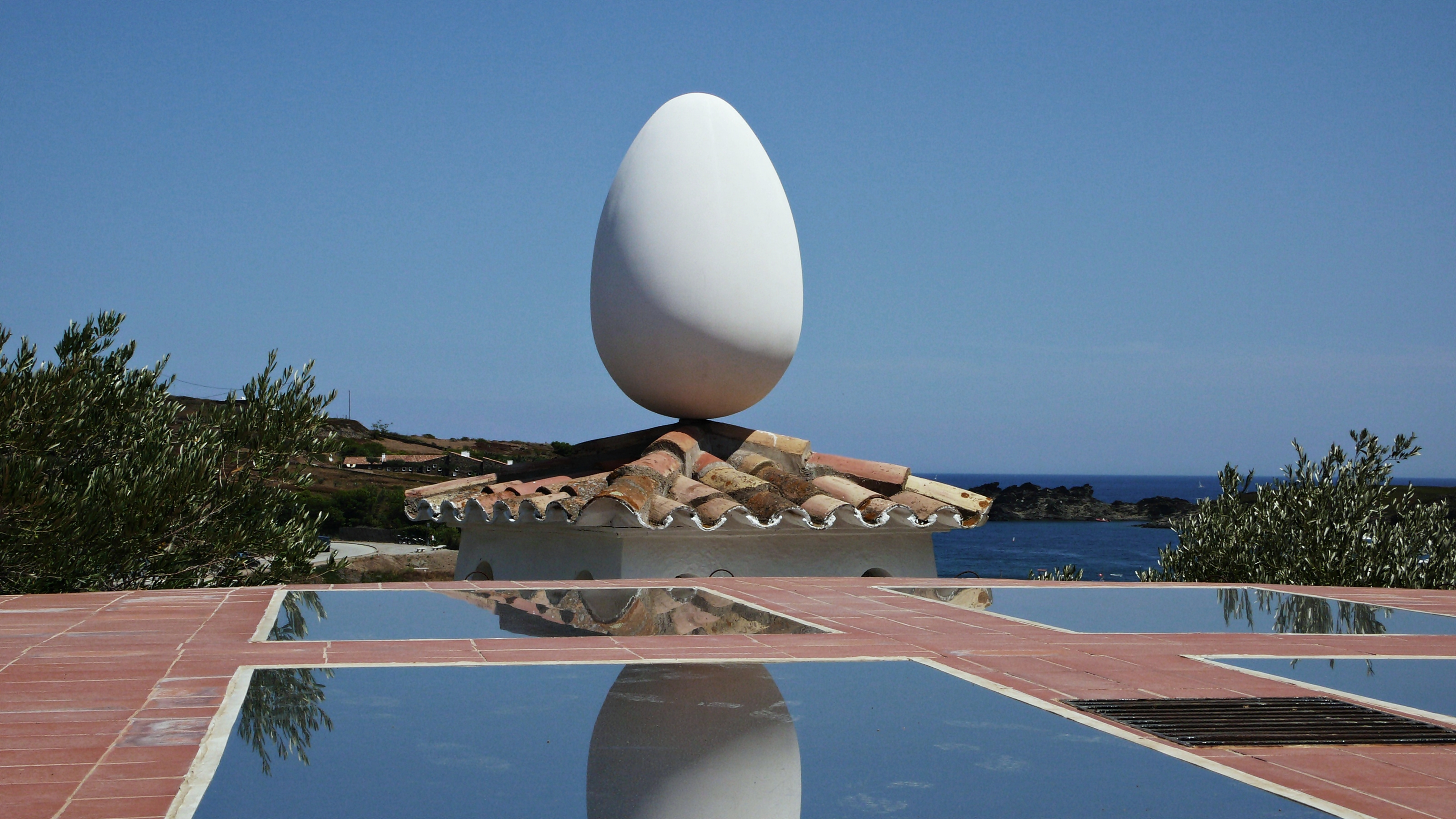 casa museo